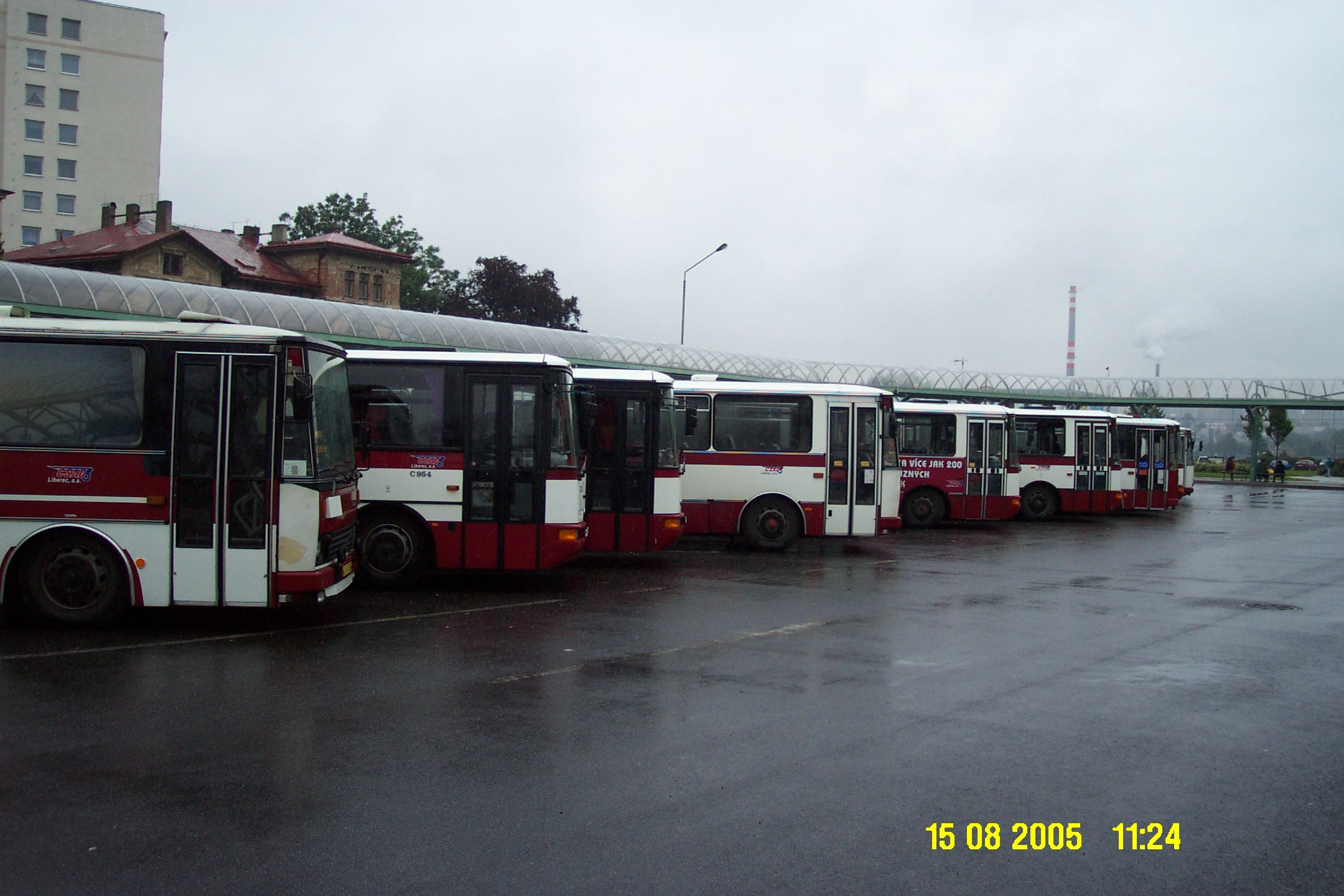 Různé autobusy ČSAD Liberec